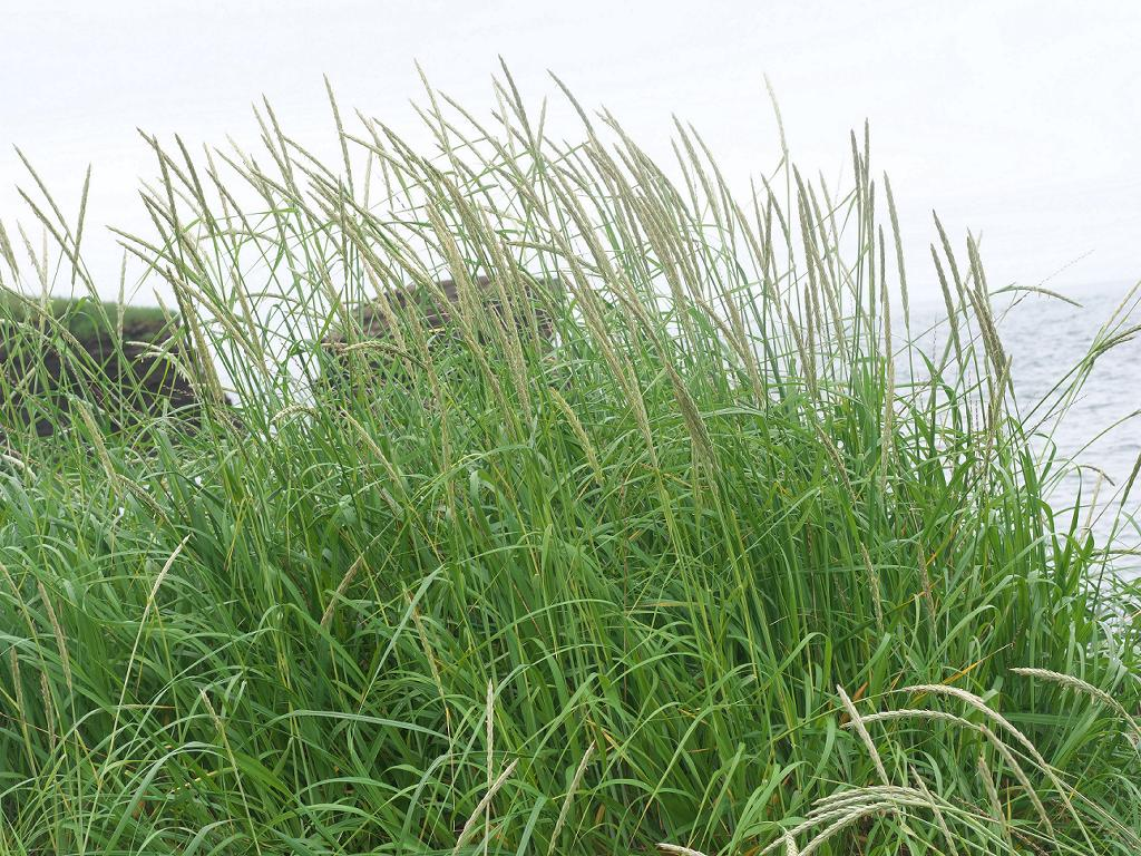 2020/07/02 北海道根室市：Nemuro City, Hokkaido, Japan